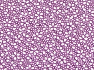 Détail d'un motif de type Edo komon Catégorie:Textile